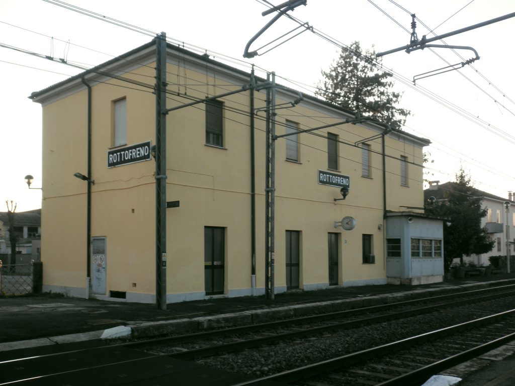 Stazione ferroviaria di Rottofreno